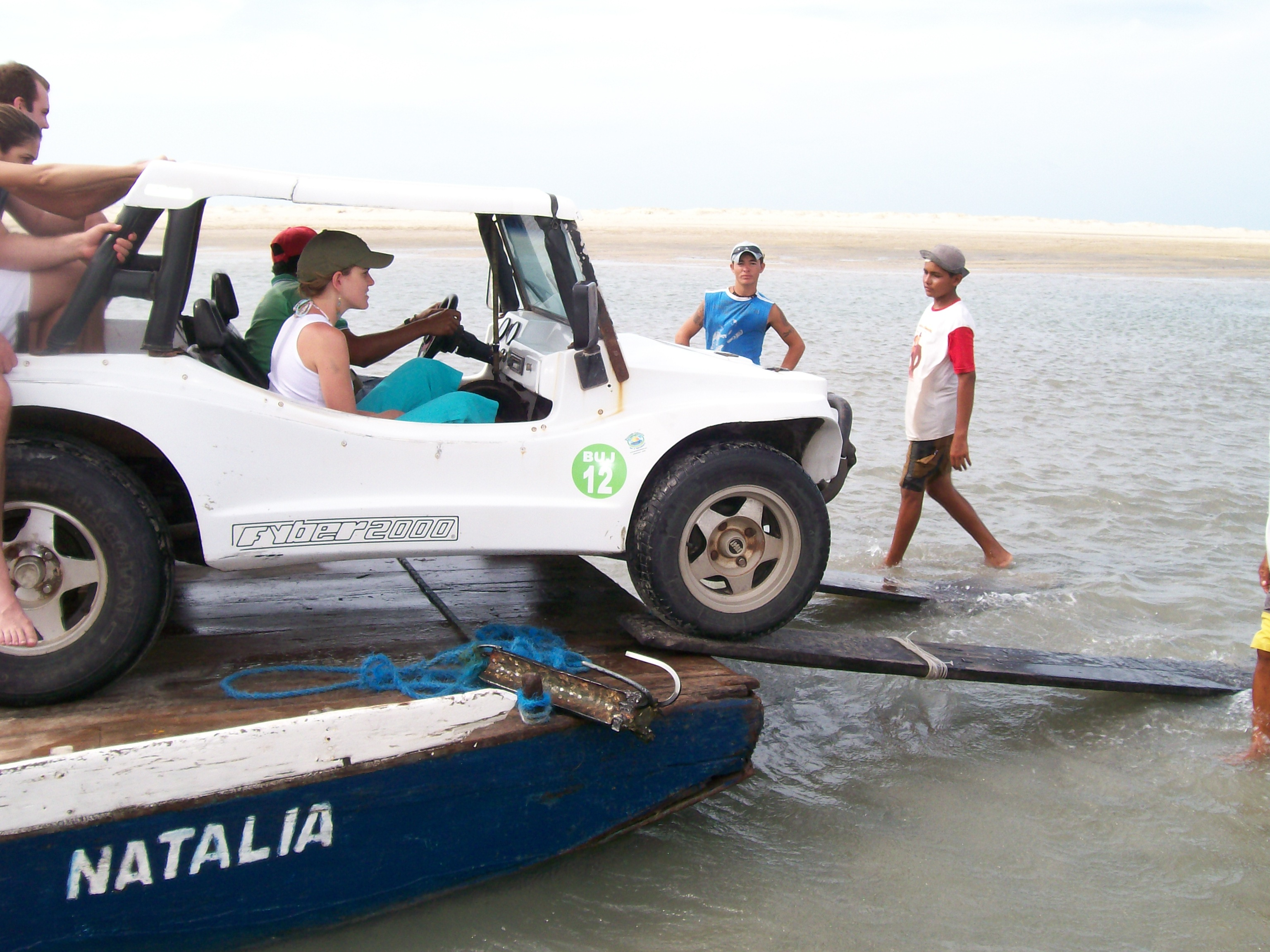 Desembarque da balsa